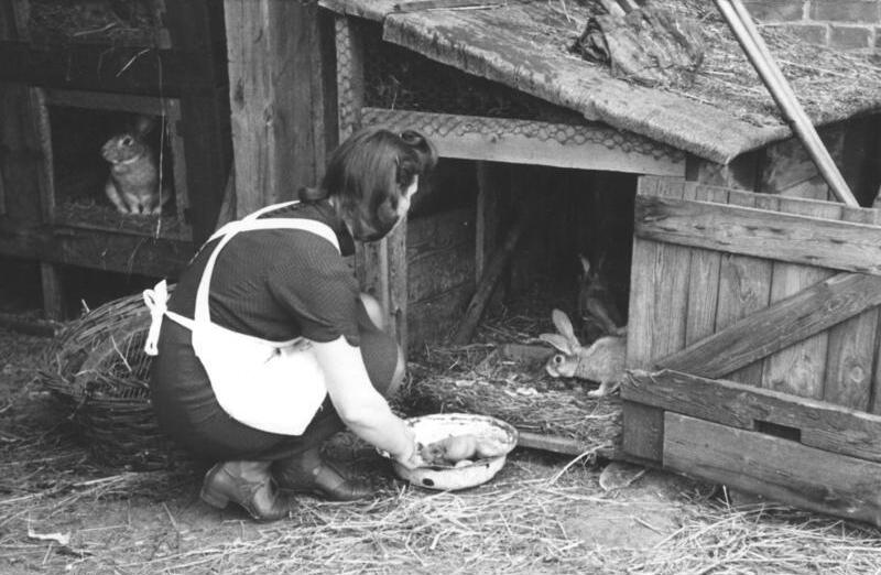 Berlin; Frühjahr 1946 Kaninchenfüttern. Aufnahme: Erich O. Krüger 205-46